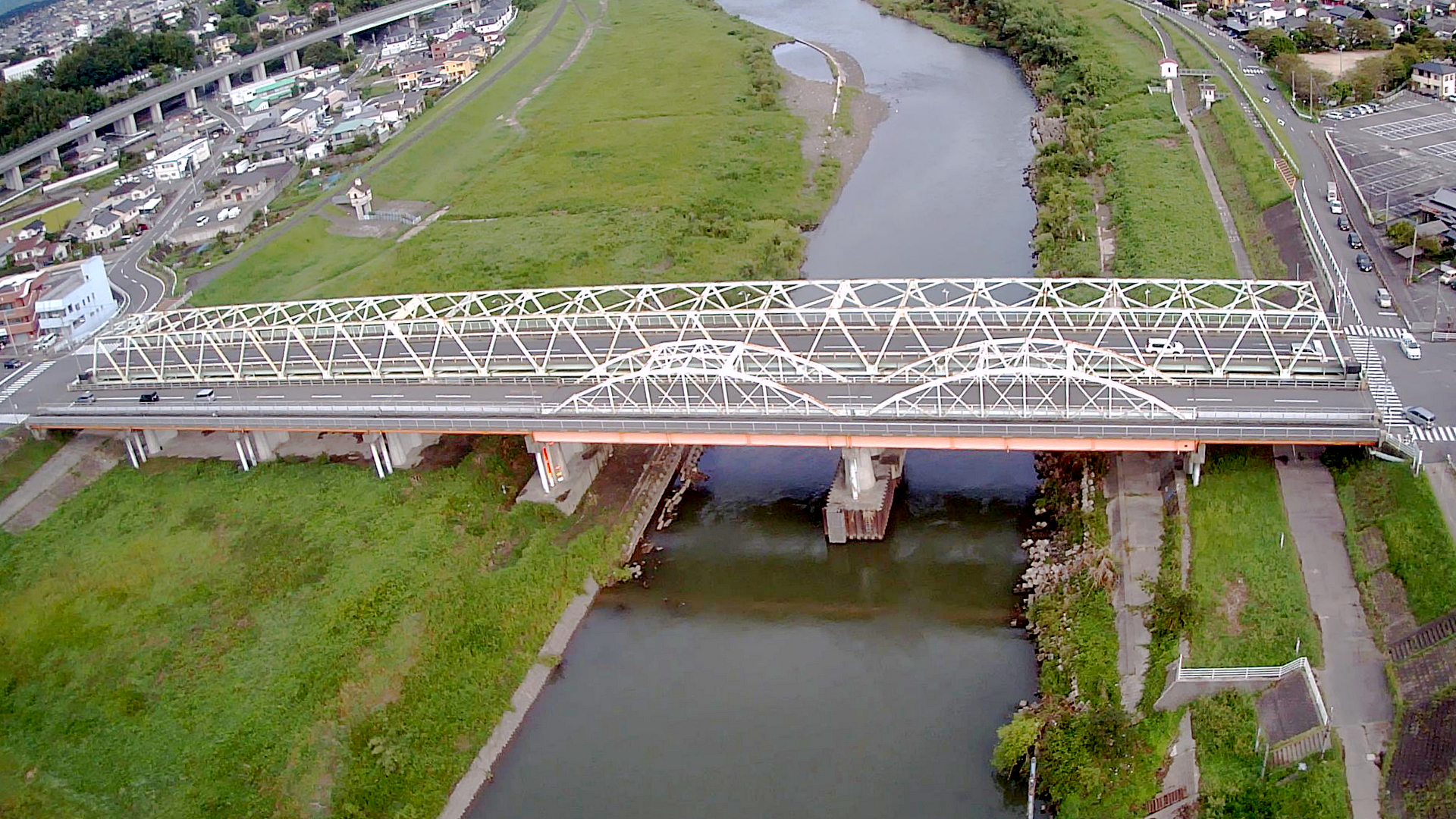 大分川に架かる明磧橋